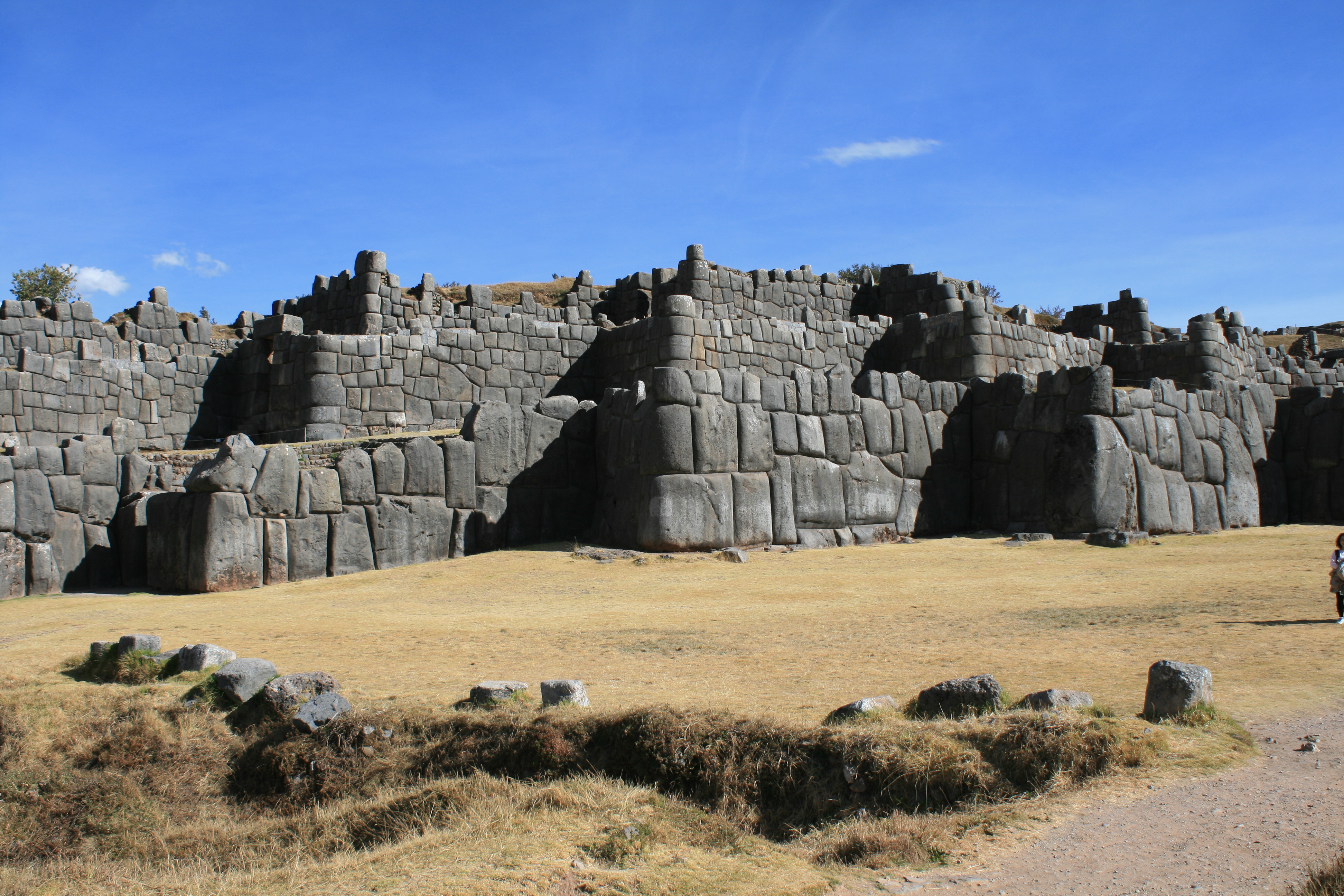 Sacsaywaman